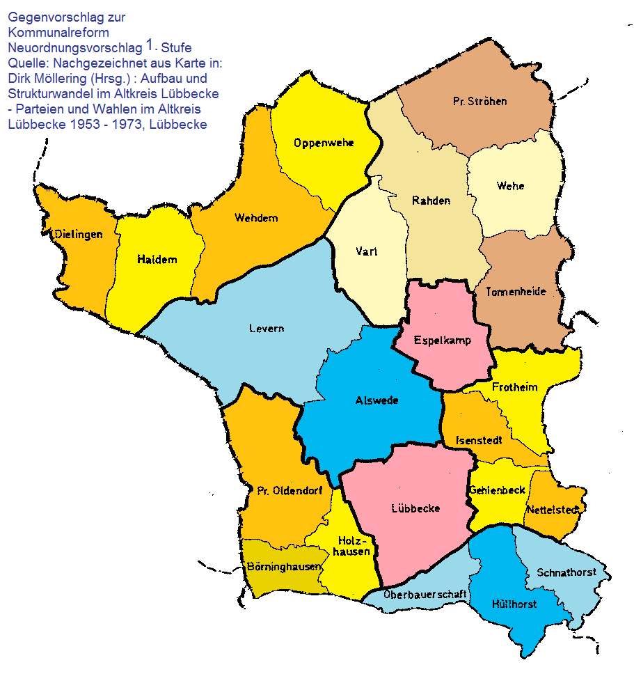 Gliederungsvorschlag für den Kreis Lübbecke, 1. Stufe